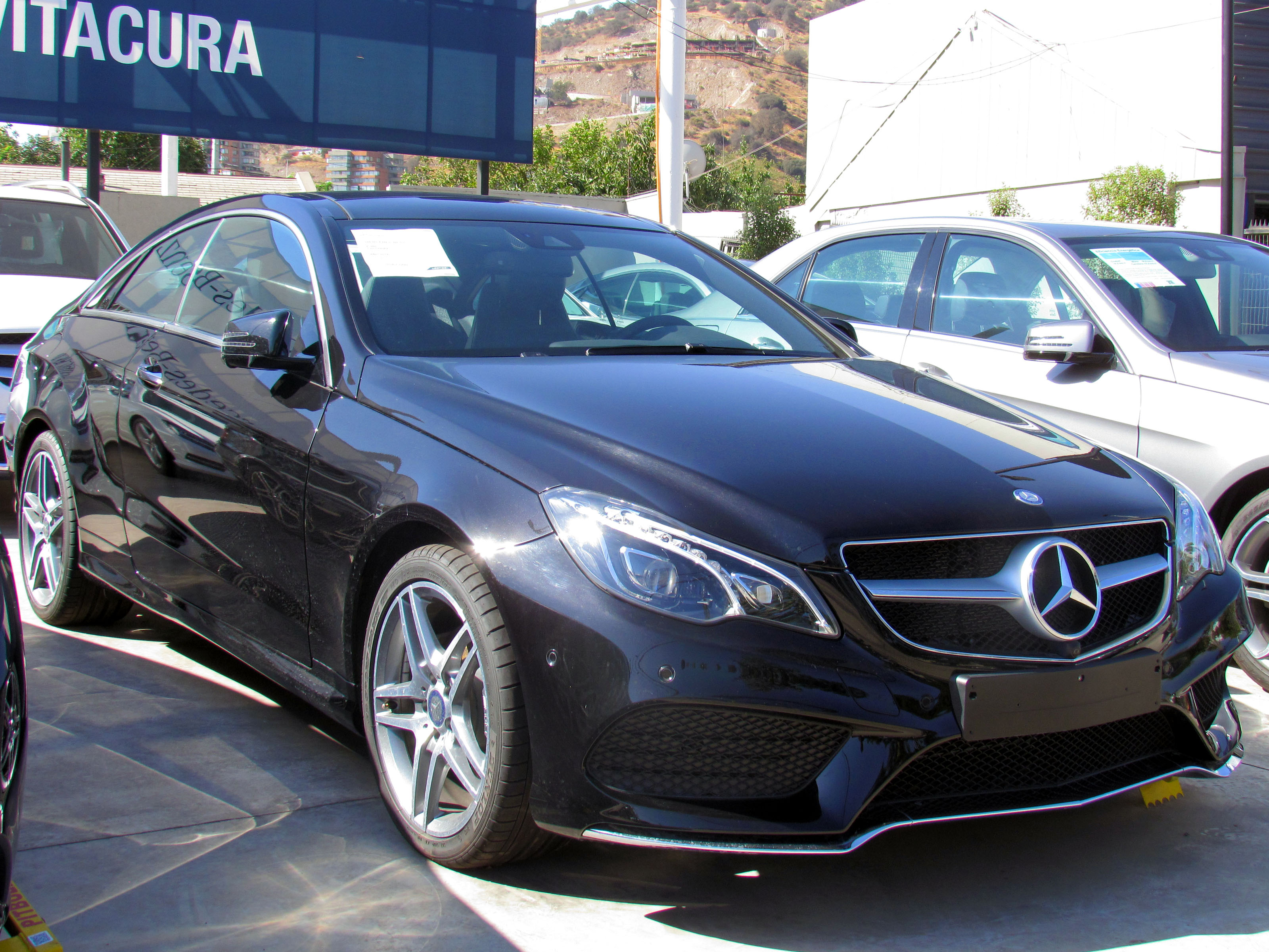 Mercedes Benz E 350 Coupe 2014